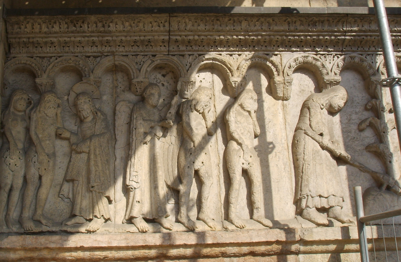 duomo di modena